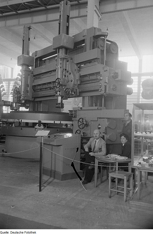 Original image description from the Deutsche Fotothek Werkzeugmaschine